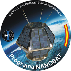 Insignia creada para conmemorar el Programa Nanosat del INTA